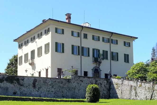 Villa Camozzi venne edificata intorno alla metà del XVIII secolo dalla famiglia De Gualtis. Venduta poi a Luigi Camozzi, rimase di proprietà della famiglia Camozzi fino al 1977. Nel 1986 fu acquistata dal Comune di Grandola ed Uniti. Attualmente ospita il municipio e il Museo Etnografico Naturalistico della Val Sanagra.